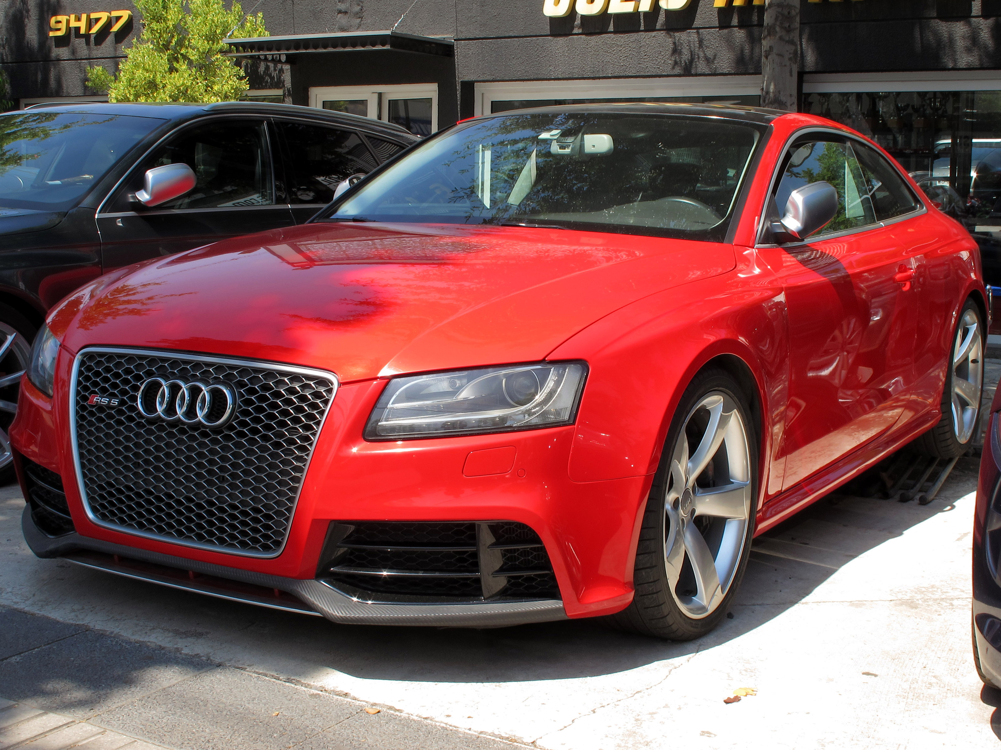 Audi RS5 2011